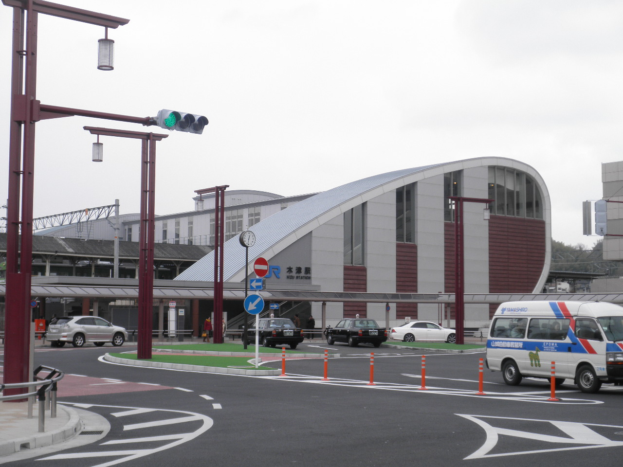 木津駅 駅舎